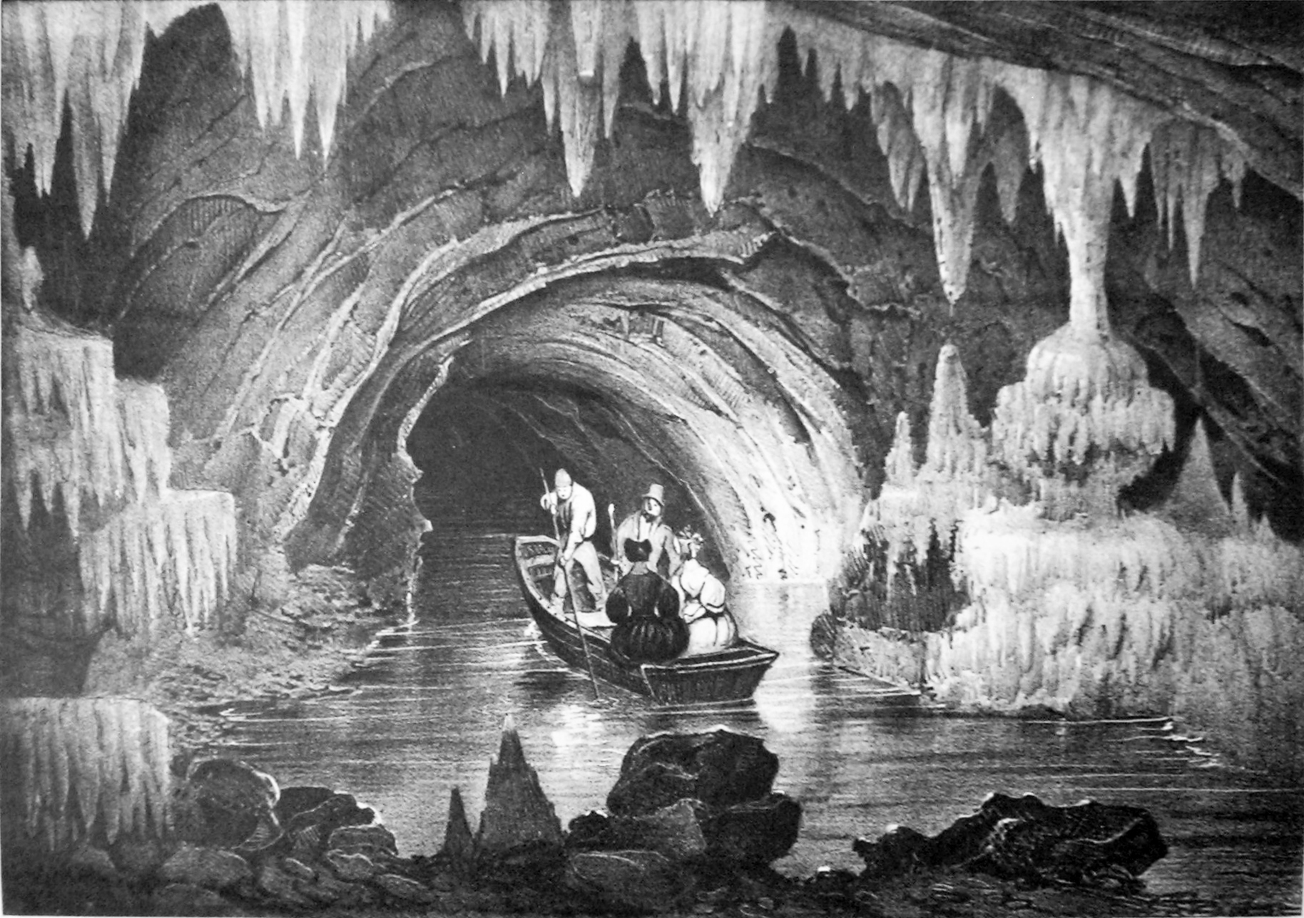 intérieur de la Grotte de la BalmeATTENTION ! Ce facsimilé est réalisé en applicant des alterations avec un logiciel graphique à une copie numérique, obtenue à partir d'une prise de photo faite par un non-professionnel. Elle pourrait ne pas être parfaitement réussie.